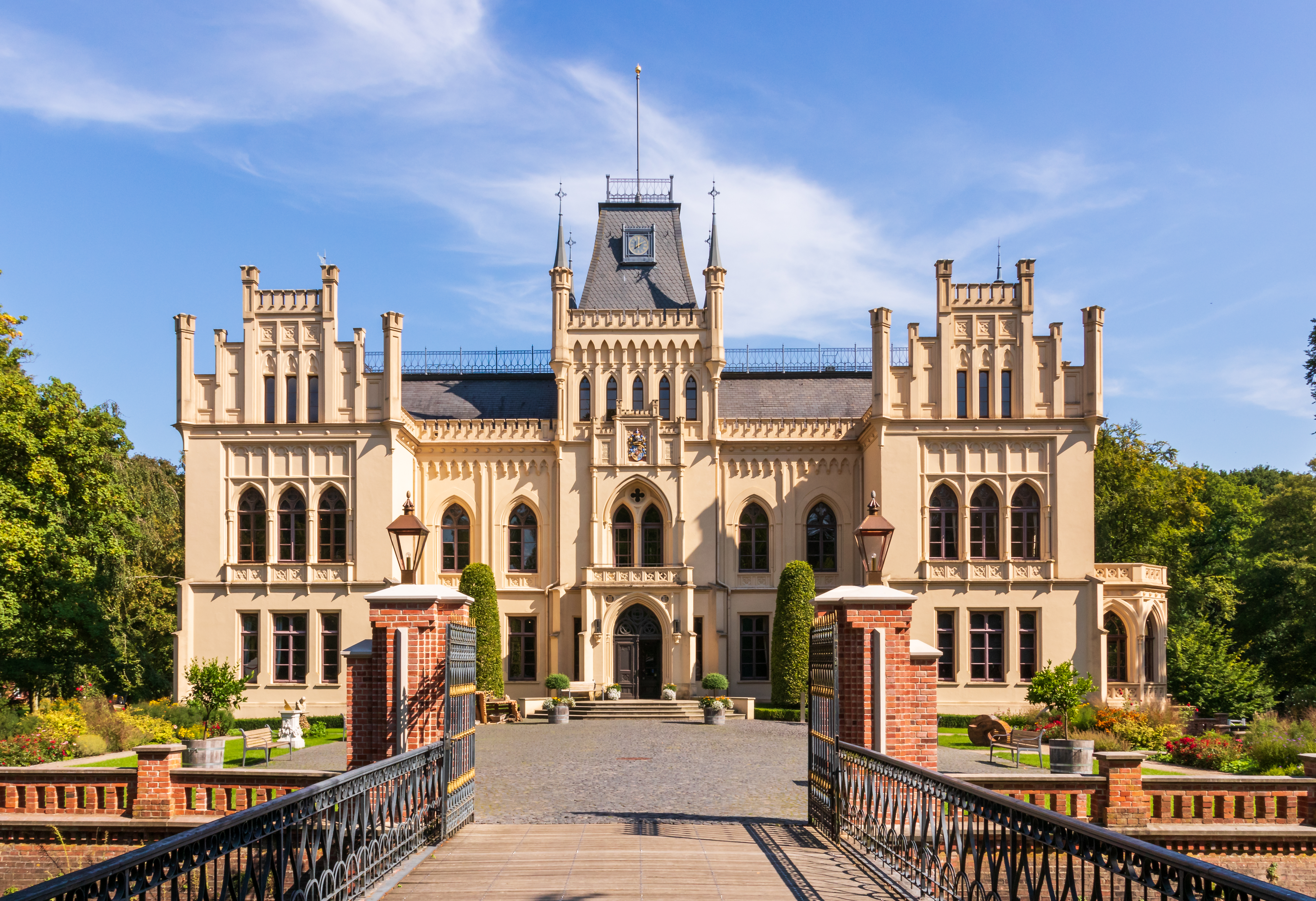 Schloss Evenburg. Auf viereckiger Insel mit gemauerten Böschungen und zwei Brücken liegend; zweigeschossiger Putzbau mit kurzen Seitenflügeln, neugotische Fassaden von 1861, vereinfacht ca. 1950. Bedeutung: historisch, künstlerisch, wissenschaftlich, städtebaulich; wesentliche Begründung: 1.05 geschichtliche Bedeutung aufgrund des Zeugnis- und Schauwertes für Bau- und Kunstgeschichte; Gruppe gemäß § 3.3 NDSchG; in Gruppe baulicher Anlagen: 457013Gr0032